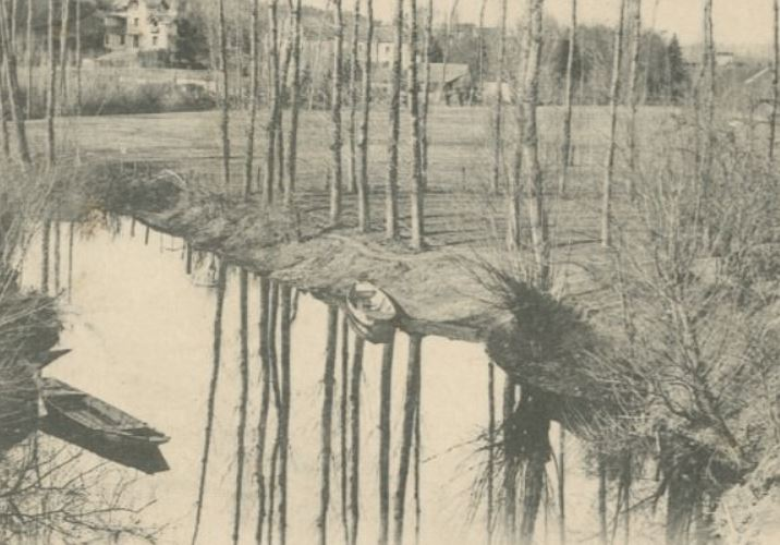 Les rives et bords de la Choisille à Fondettes.